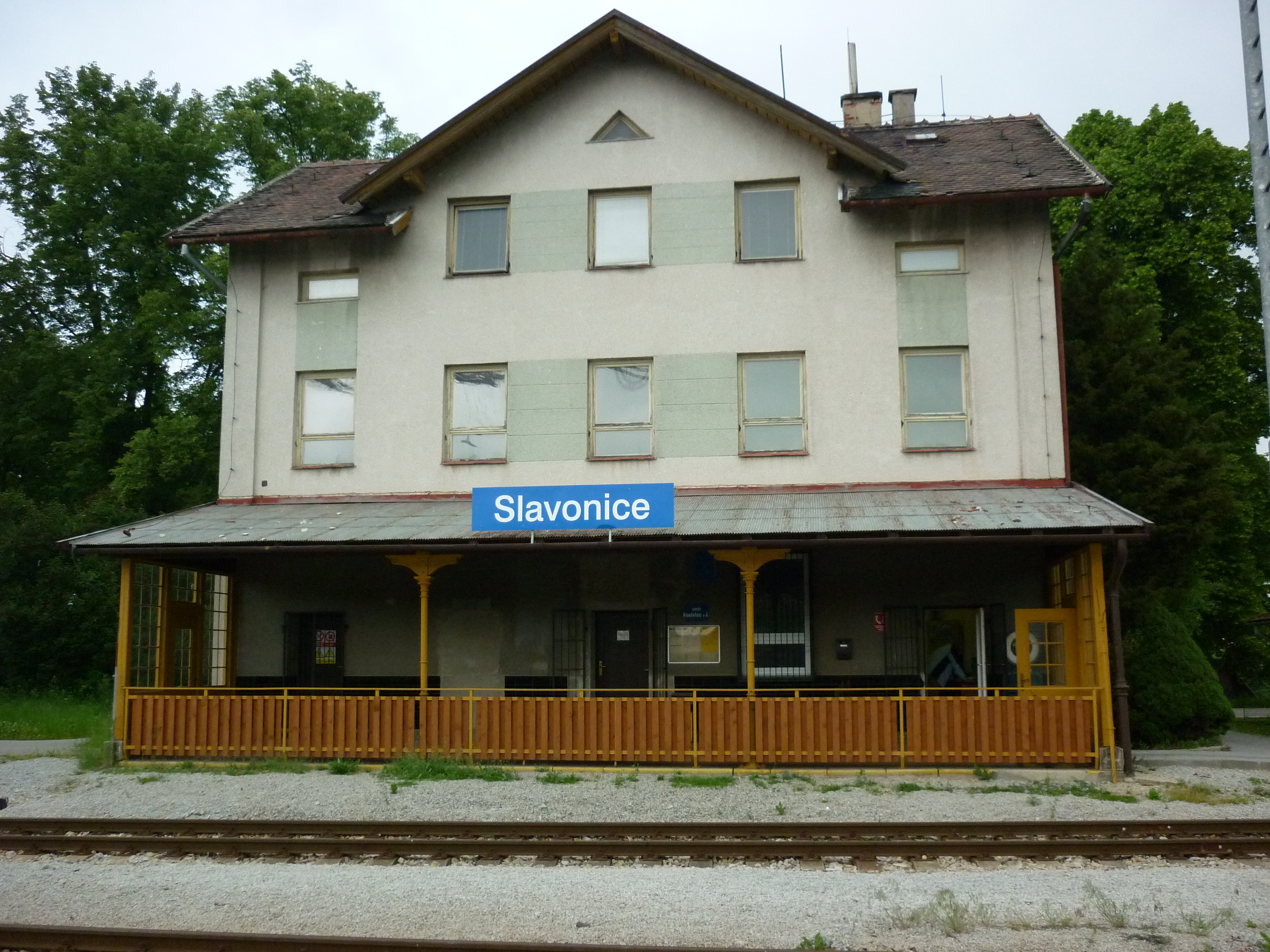 Nádraží ČD Slavonice